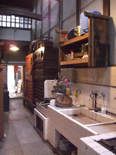 四条京町家の流し。